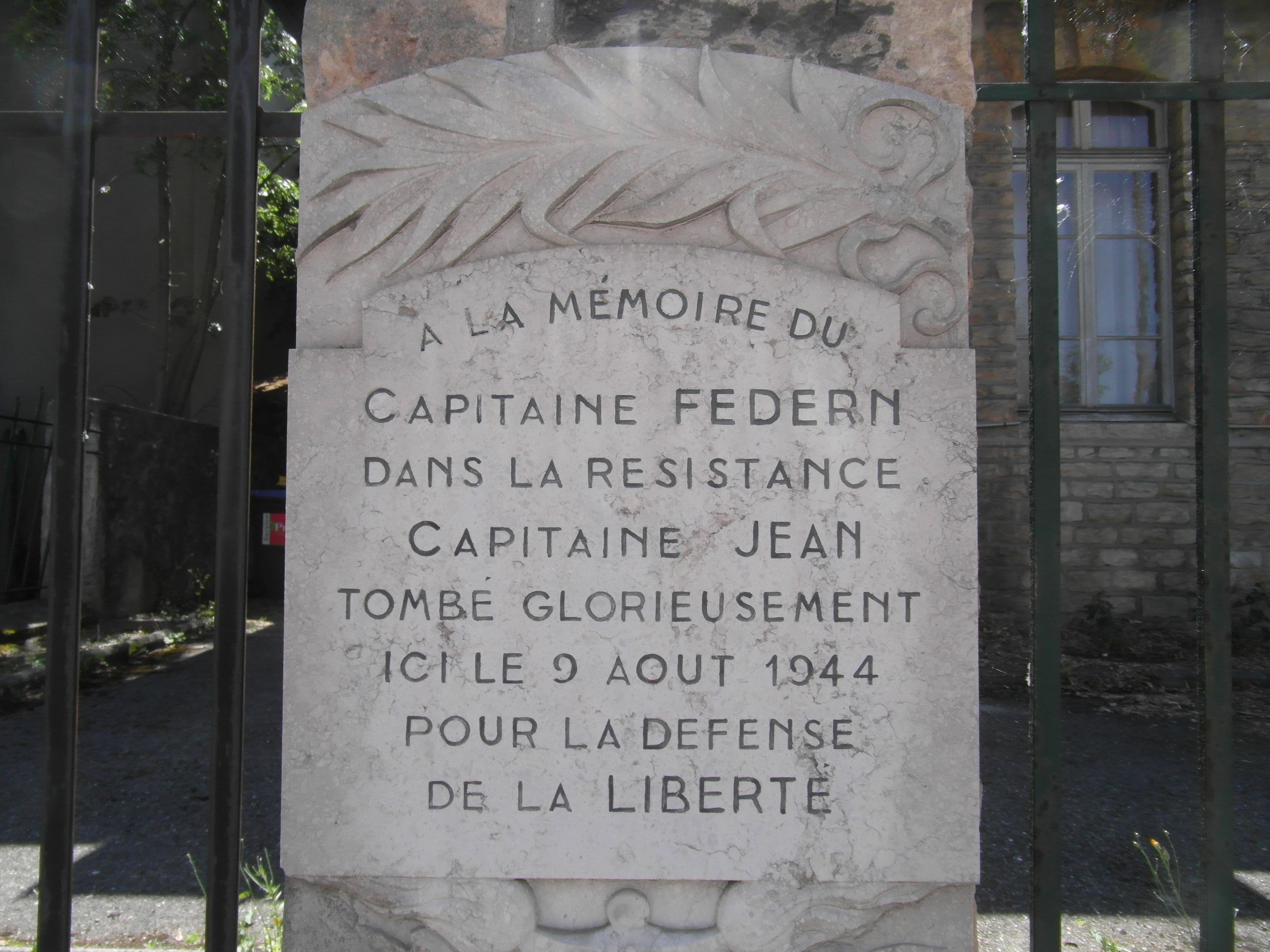 Plaque dédiée au Capitaine Jean